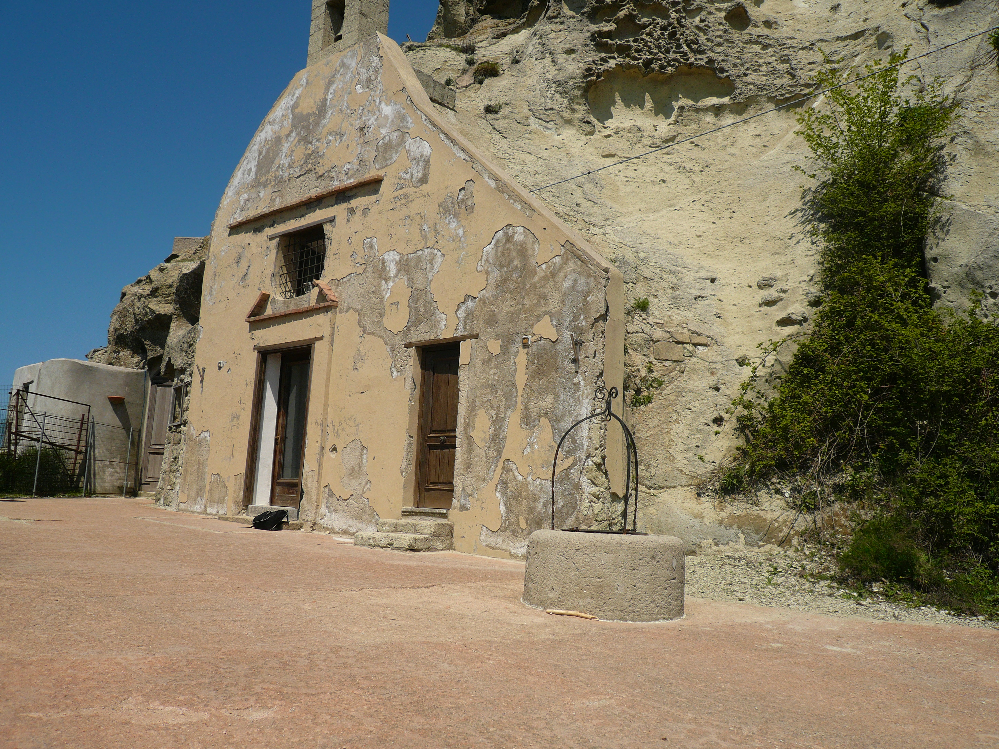 Eremo di San Nicola scavato nel tufo verde della cima del Monte Epomeo (isola d'Ischia). Autore foto: Roberto De Martino